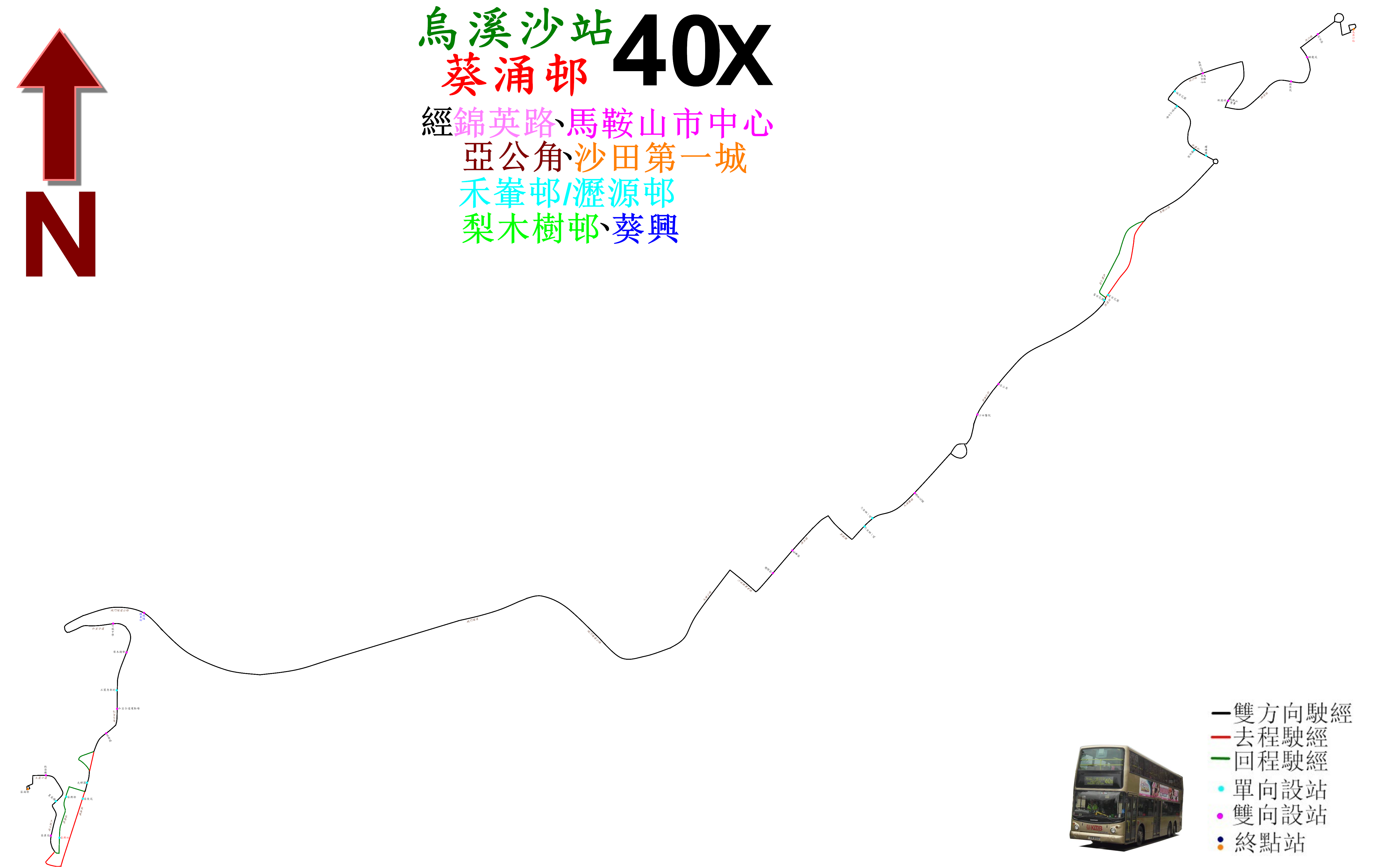 中文（香港）: 九巴40X線的走線圖